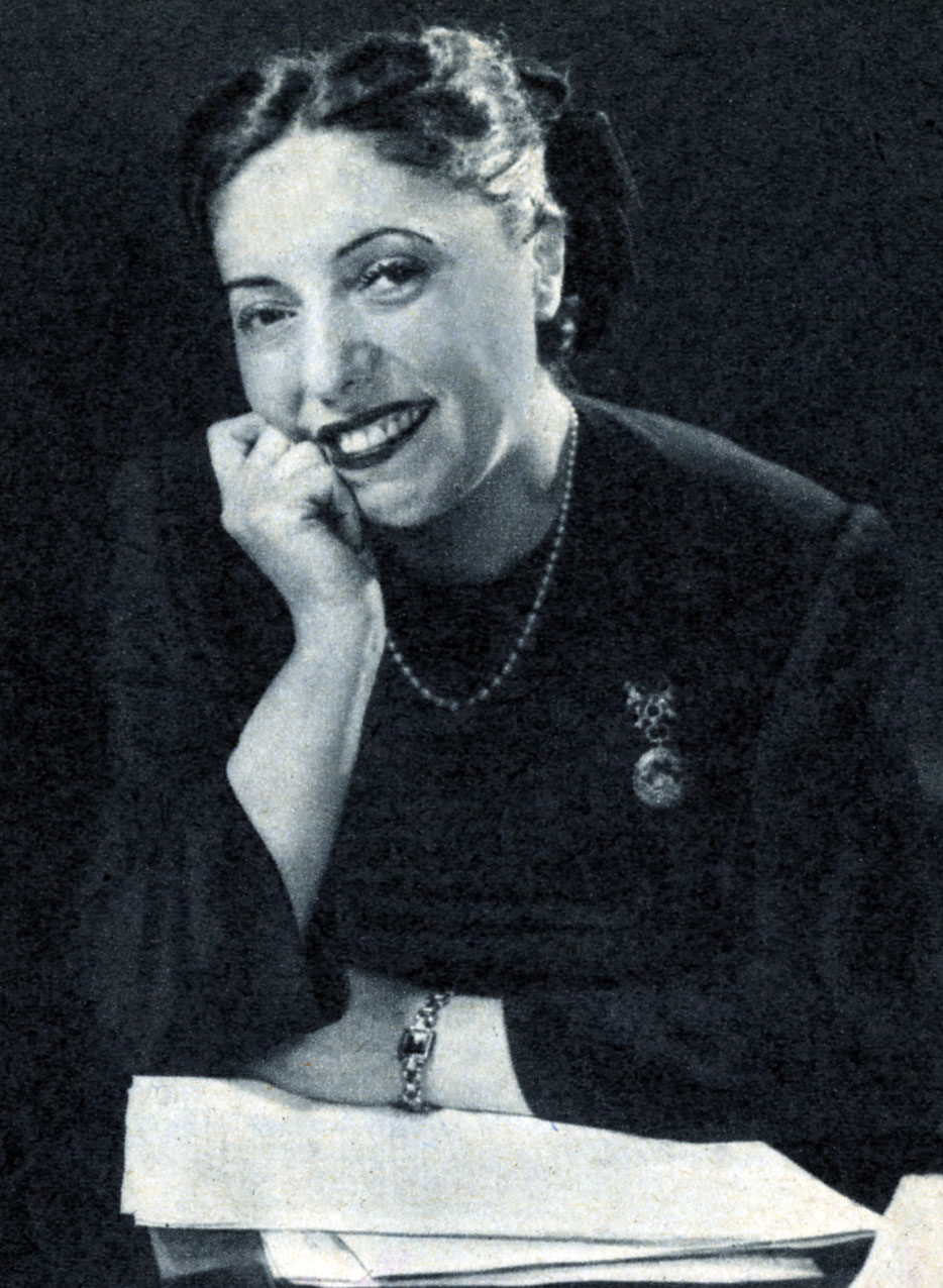 photo from magazine Radiocorriere (1955)